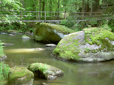 Felsblöcke im wildromantischen Waldnaabtal Fotograf: Walter J. Pilsak, Waldsassen Copyright Status: GNU Freie Dokumentationslizenz